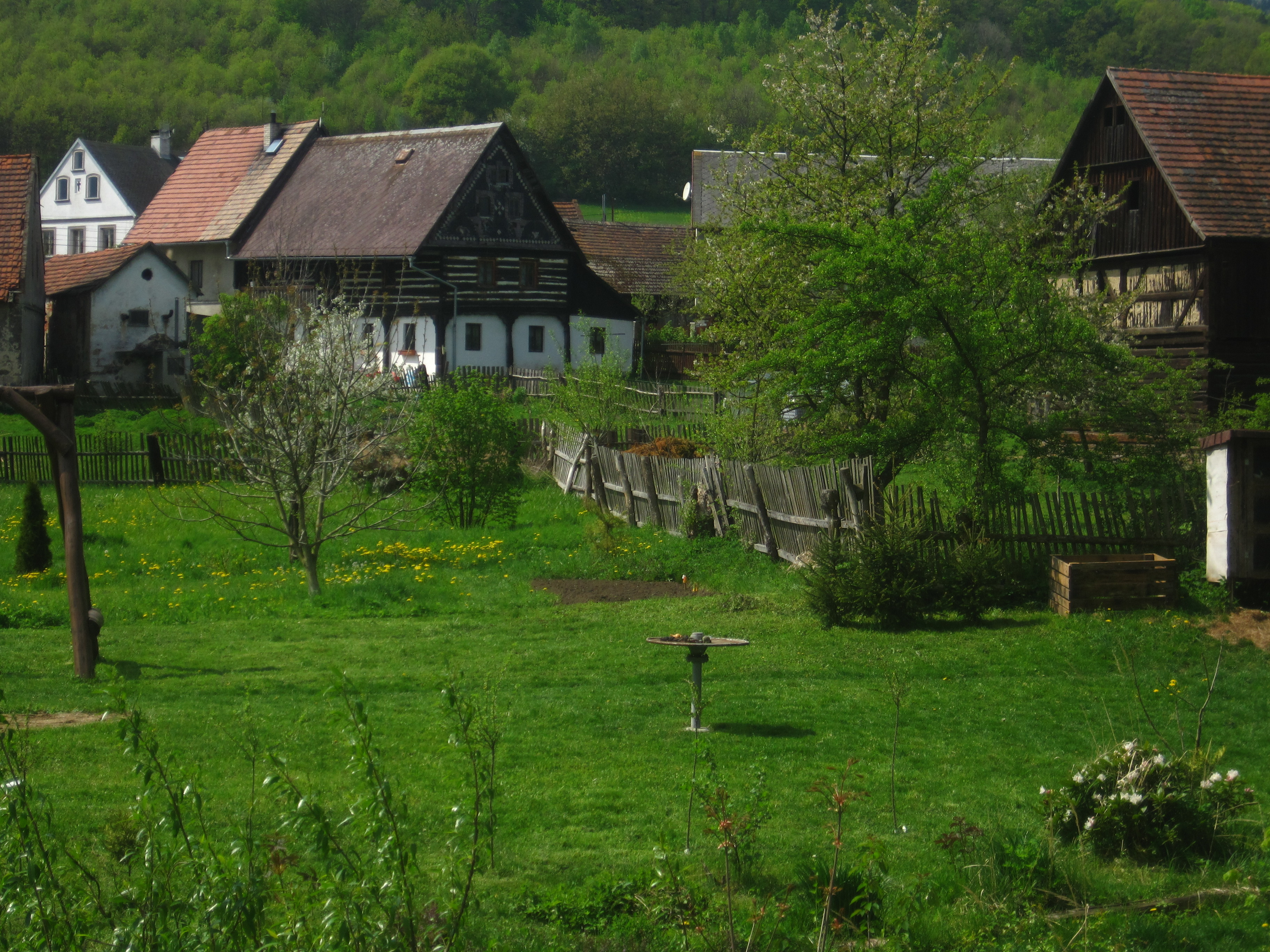 Veliká - celkový pohled, dobře vidět je zadní trakt stavení čp. 16 a roubená hospodářská stavba východně od vsi (náleží nejspíš k čp. 16)